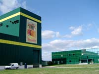 Le site de la société Sabarot-Wassner, en Haute-Loire